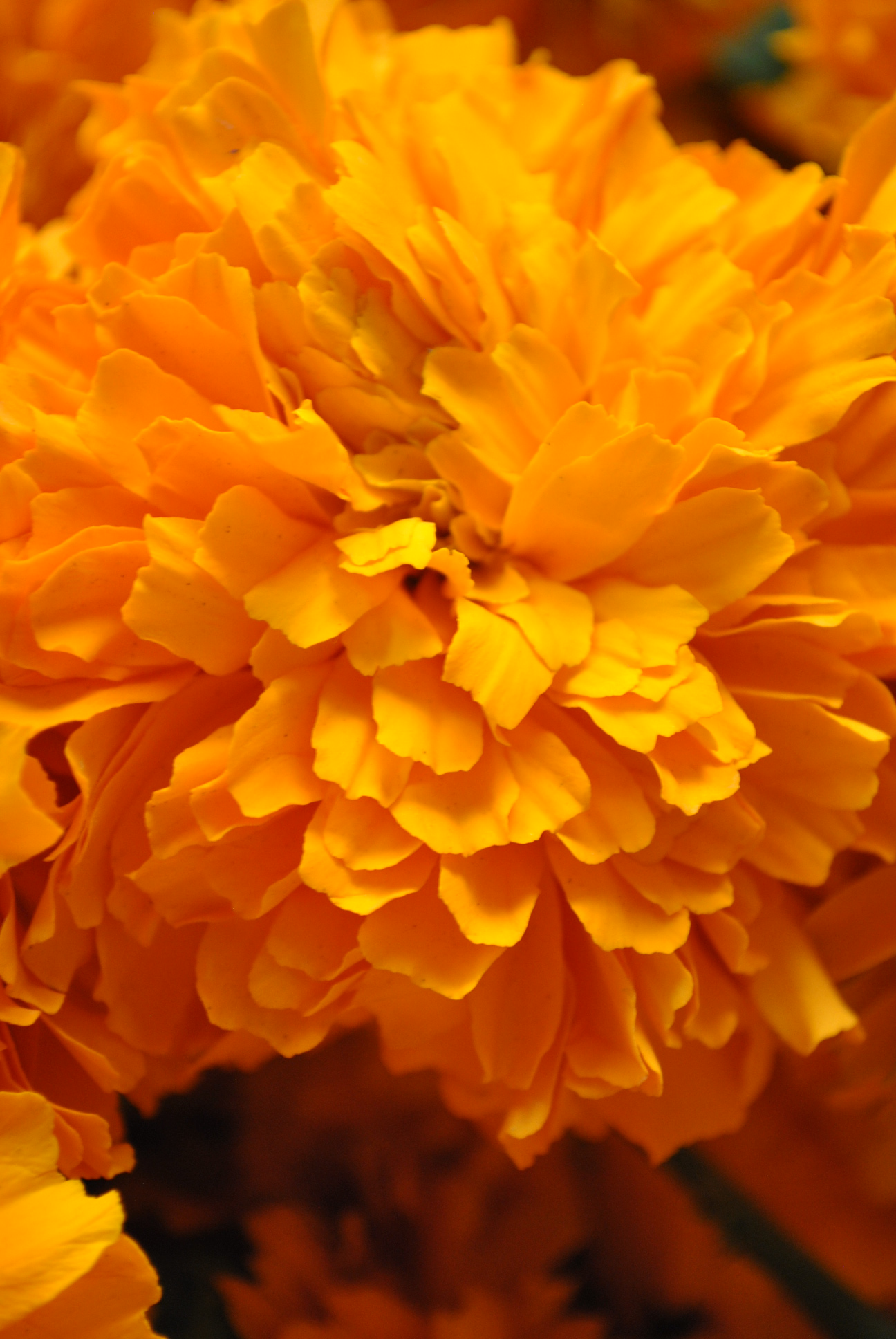 Cempasuchil